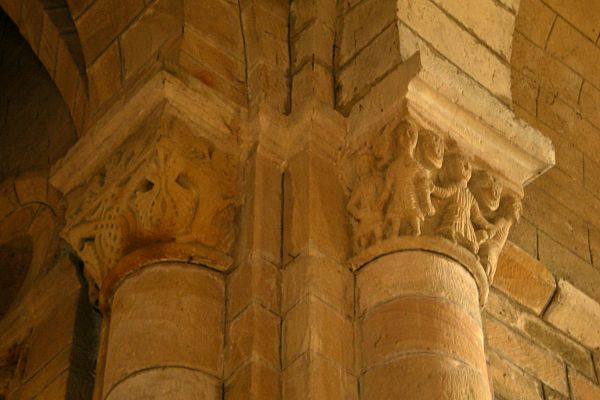 Chapiteaux de l'église Saint-Pierre à Saint-Pierre-Toirac (département du Lot, France)